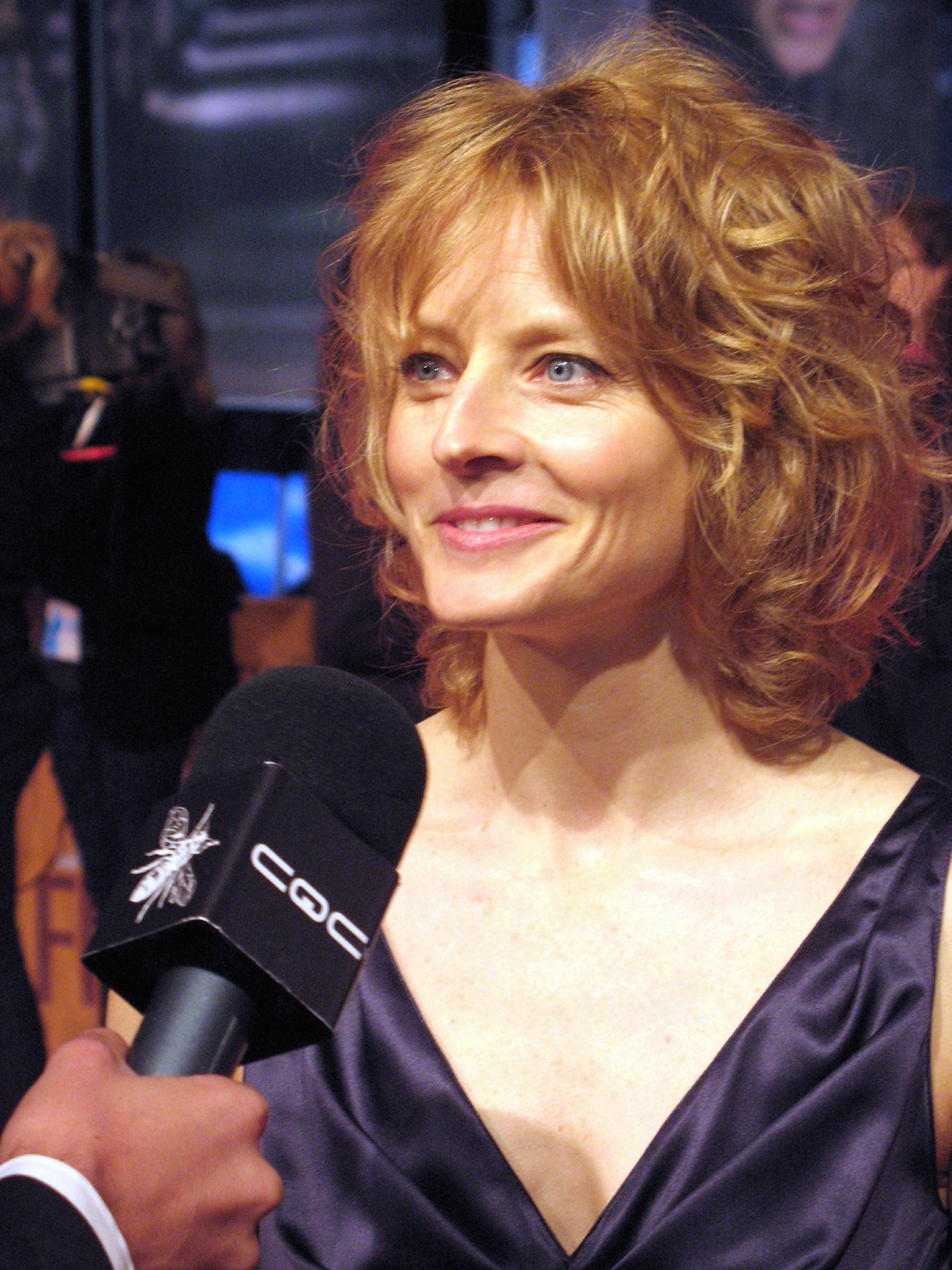 Jodie Foster bei der deutschen Filmpremiere The Brave One, Berlin, 13.9.2007